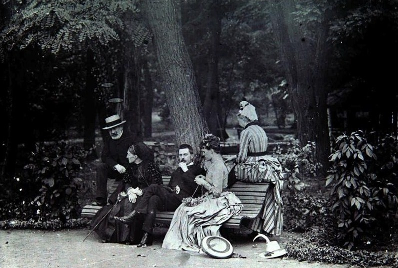 Граф Александр Алексеевич Бобринский, графиня Софья Львовна Шувалова, граф Андрей Александрович Бобринский, его жена Елена Петровна (ур. Шувалова) и графиня Софья Андреевна Бобринская.